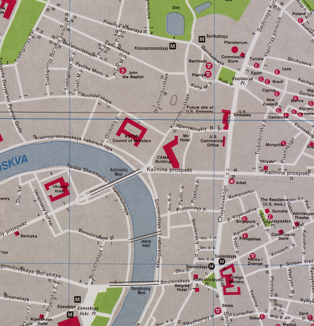 1980 Central Moscow